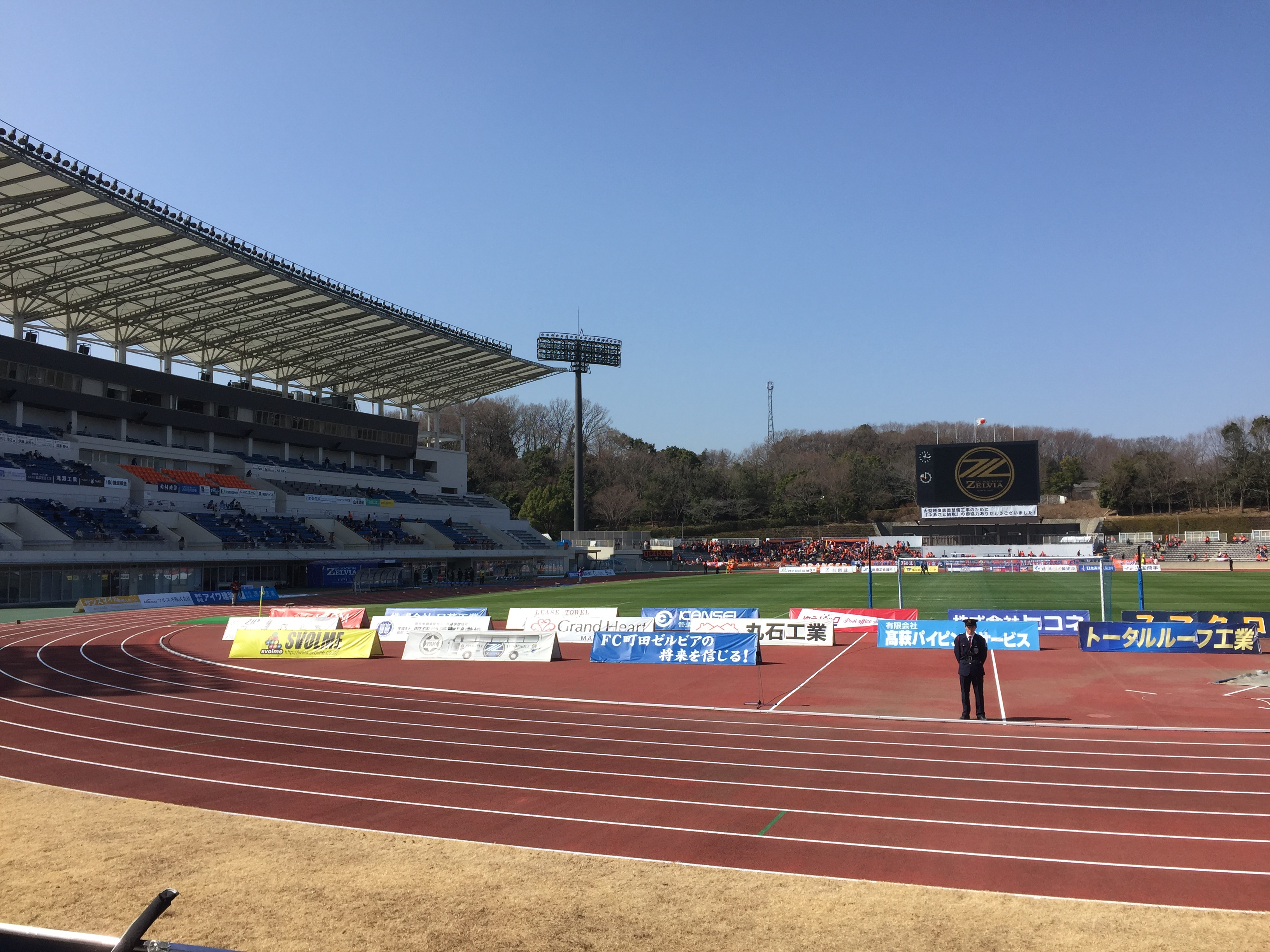 町田市立陸上競技場